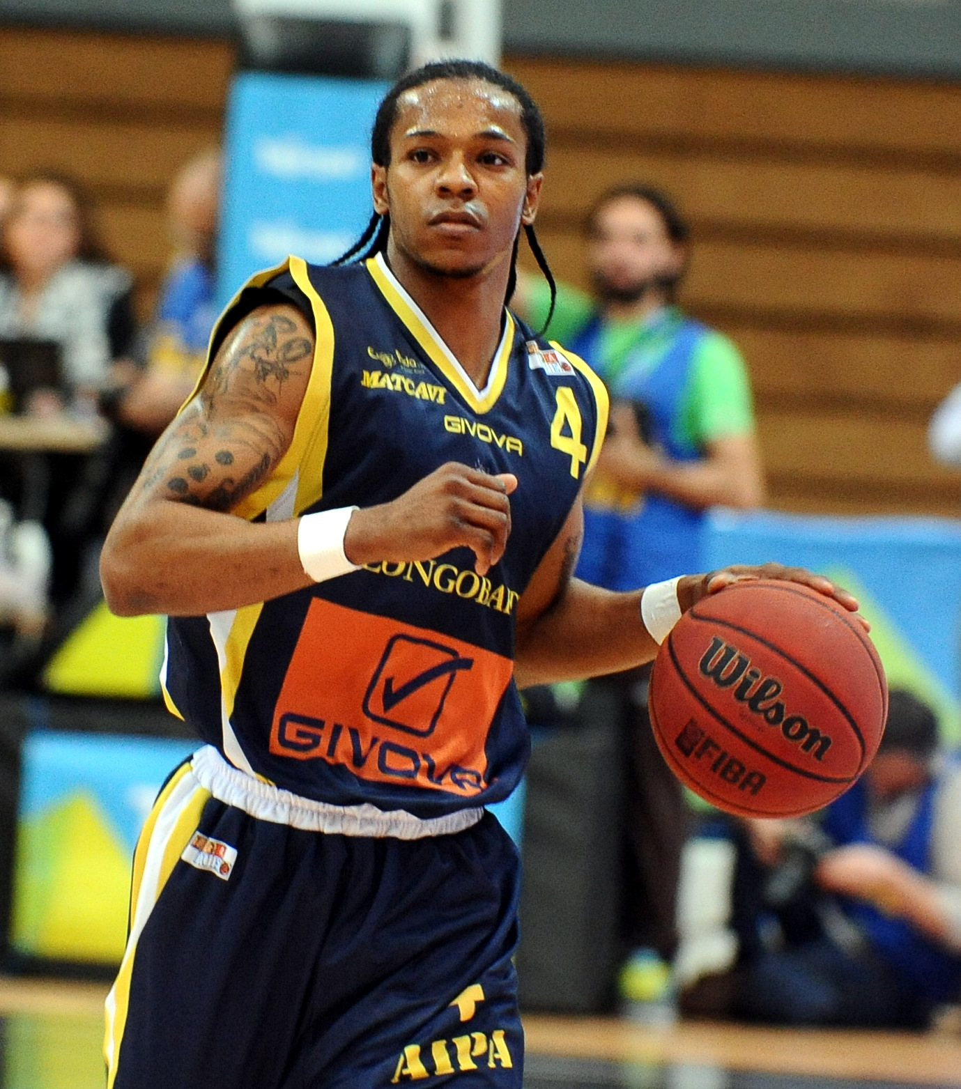 Keddric Mays con la maglia dello Scafati Basket al PalaTrento.